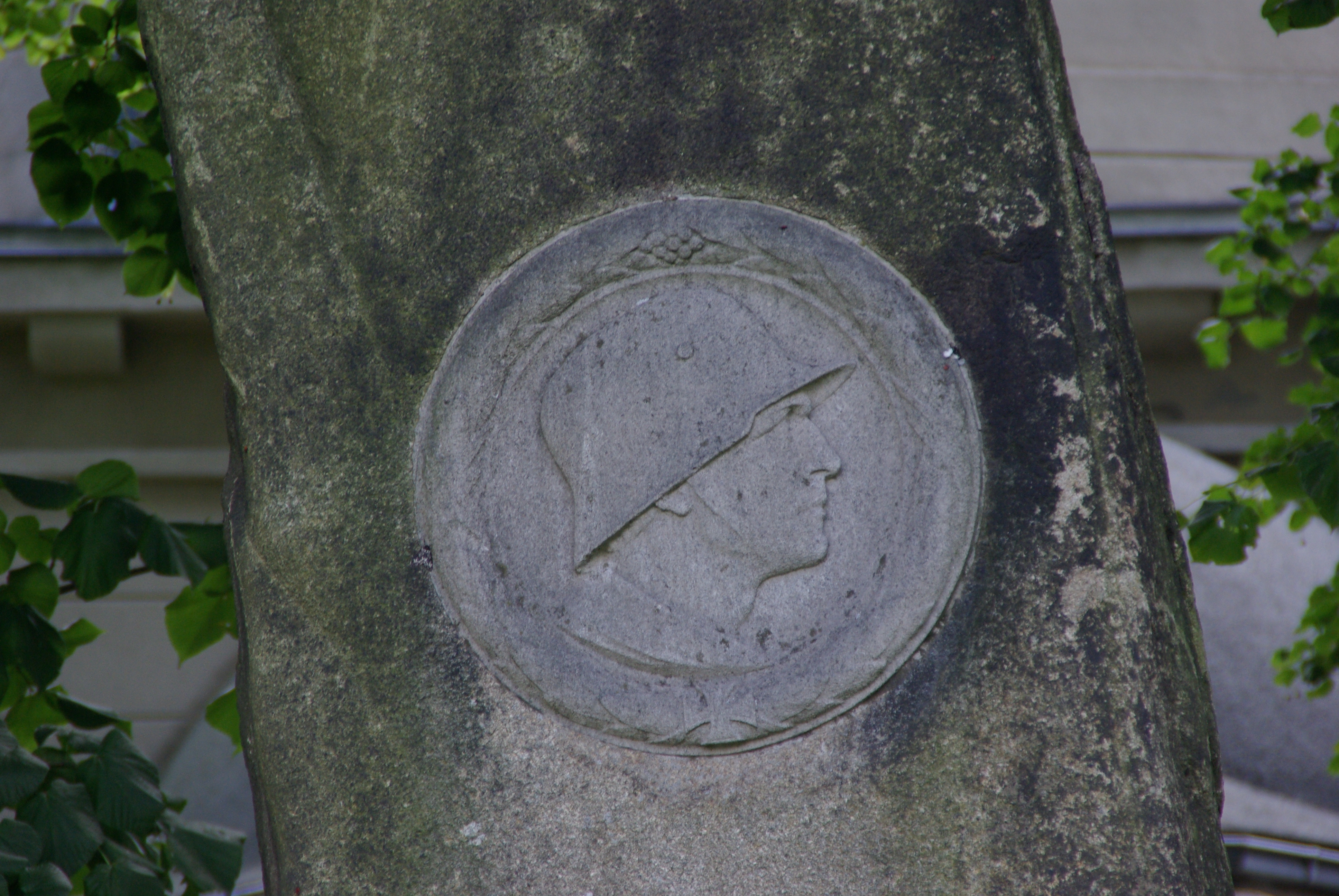 Städtischer Friedhof Altglienicke, die Medalle des Kriegerdenkmales